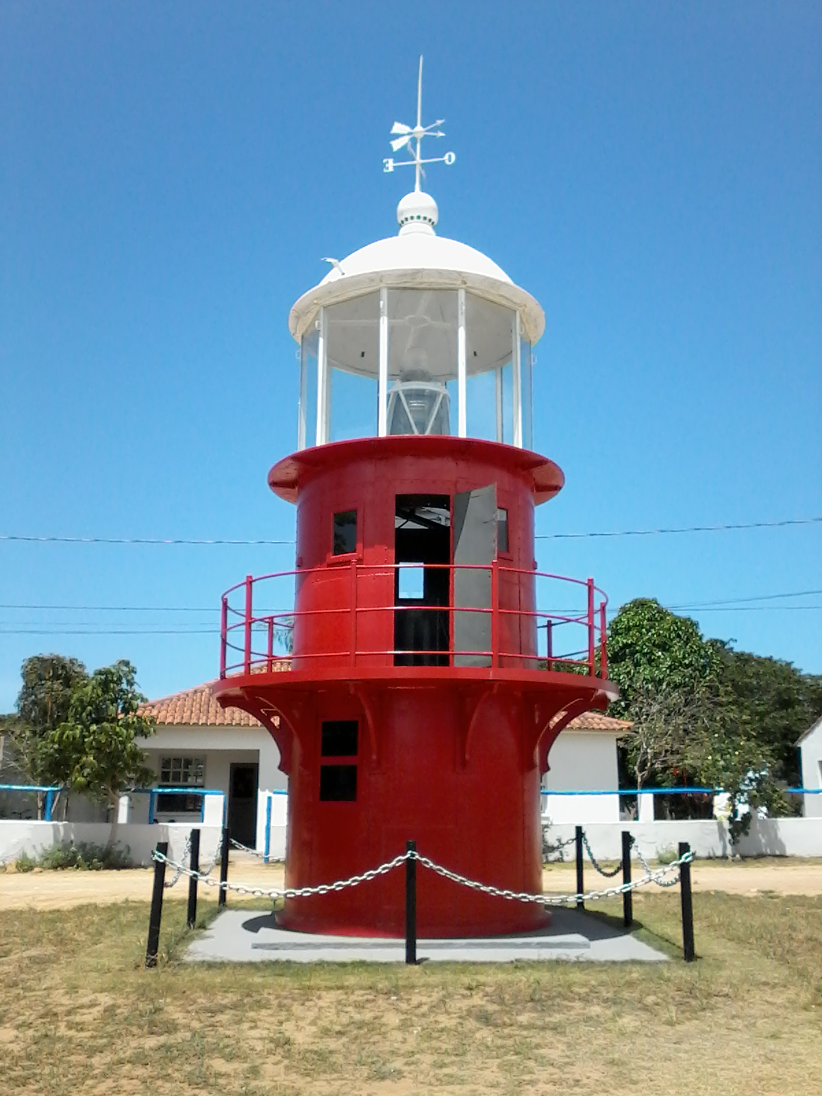 Lighthouse Regency